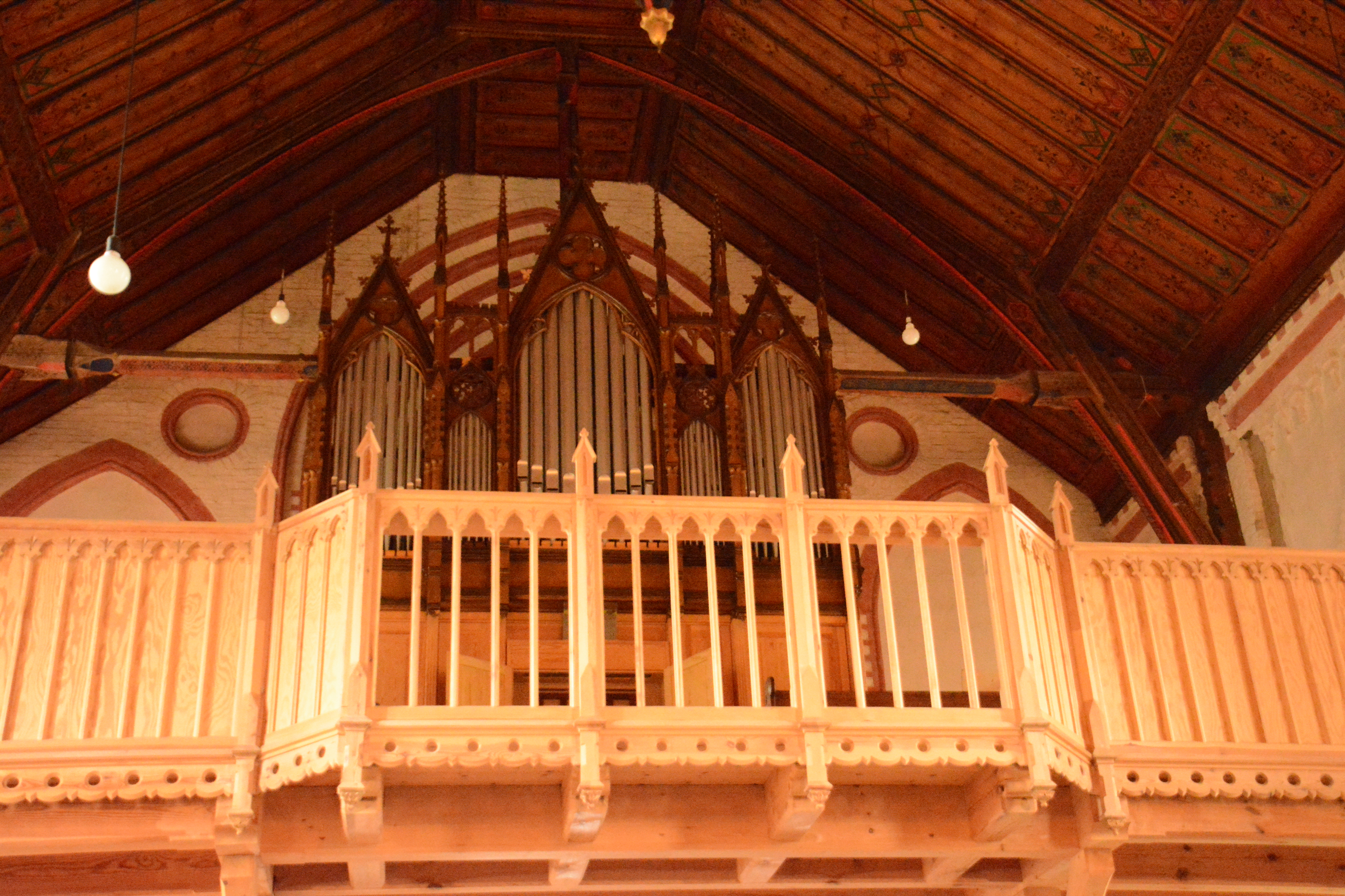 Orgelempore in der Stadtkirche Warin